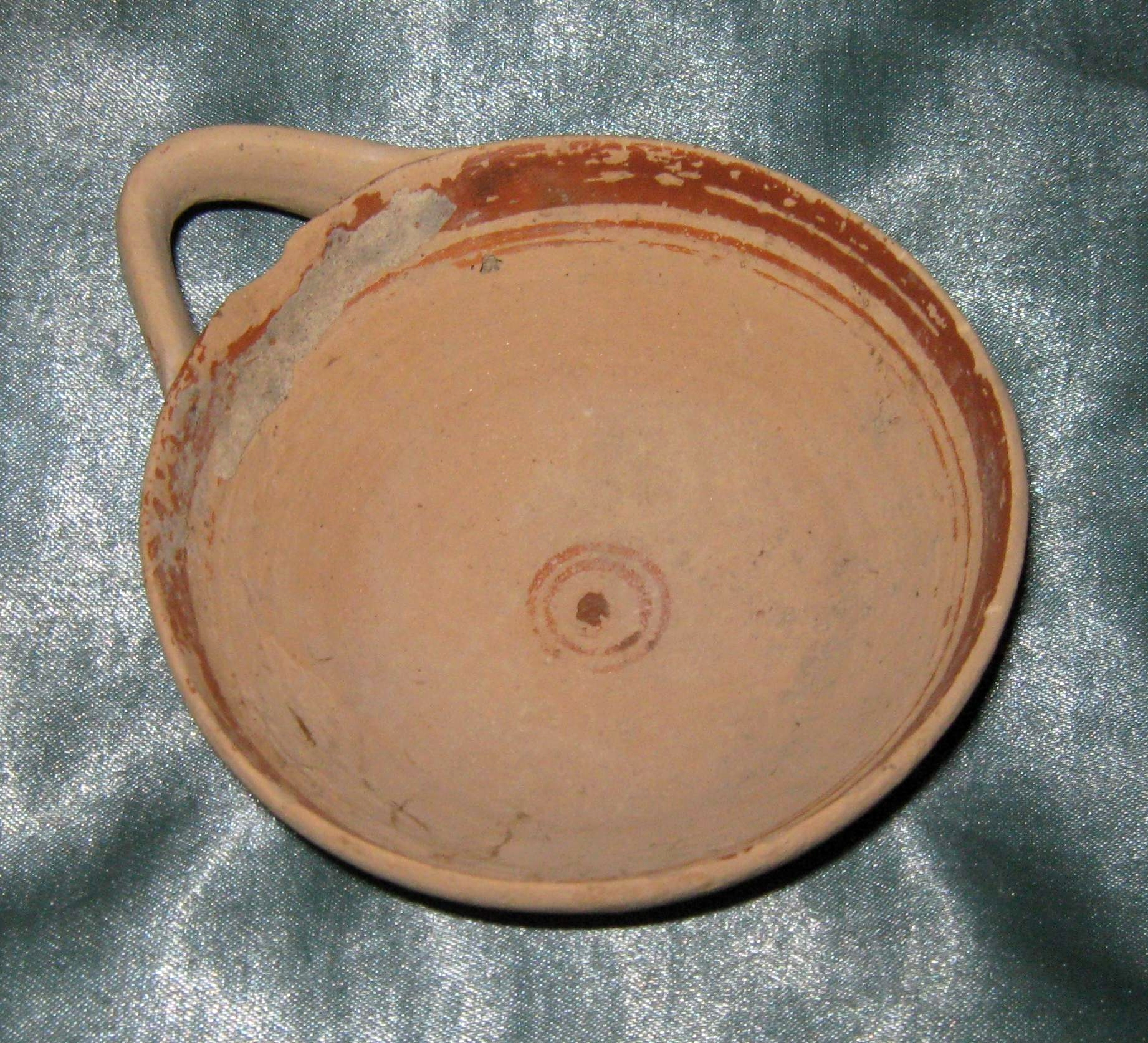 Ancient greek (apulian ?) "Dipper", Canosan style, 4th Century BC, German private Collection